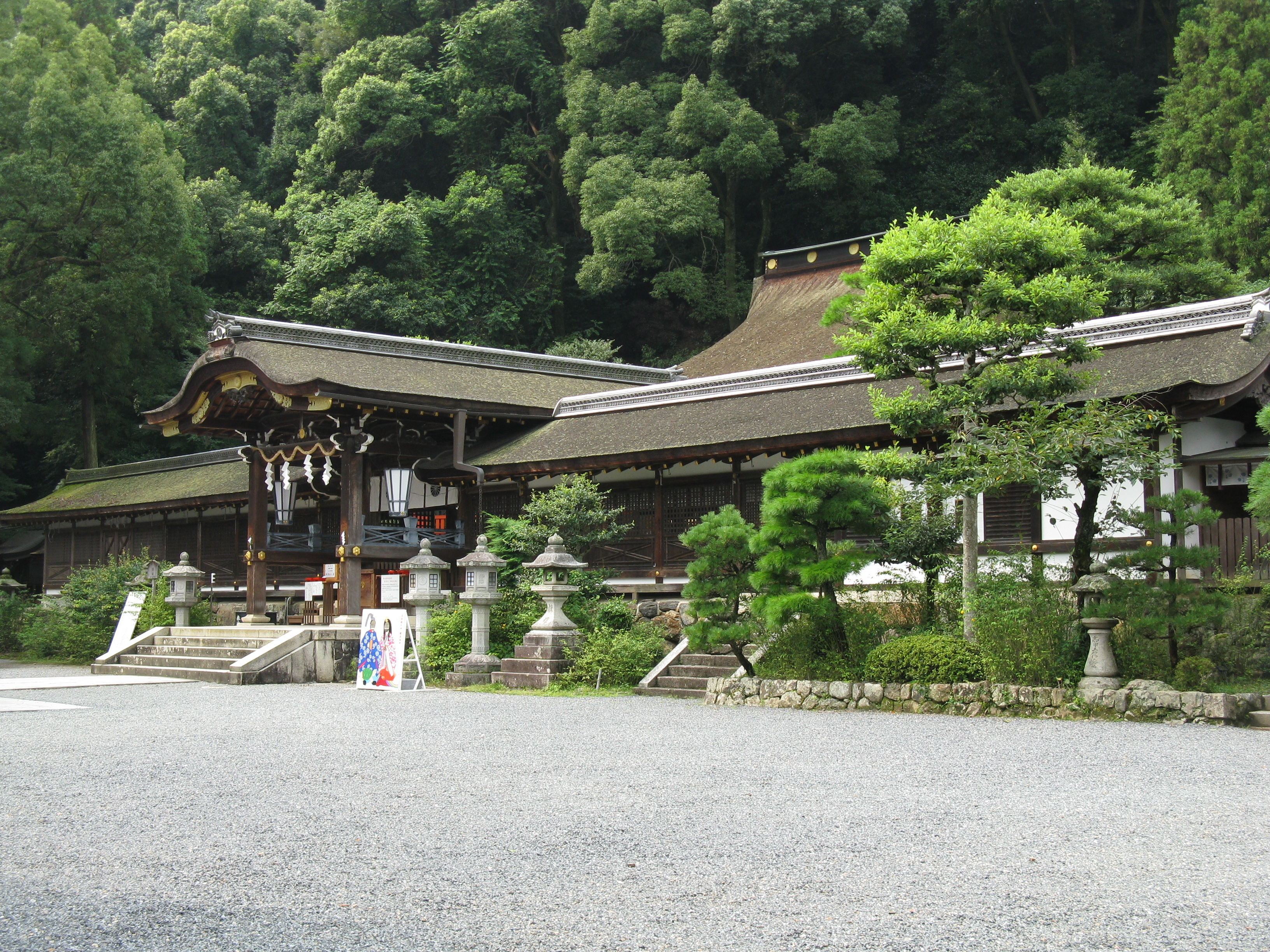 松尾大社 本殿